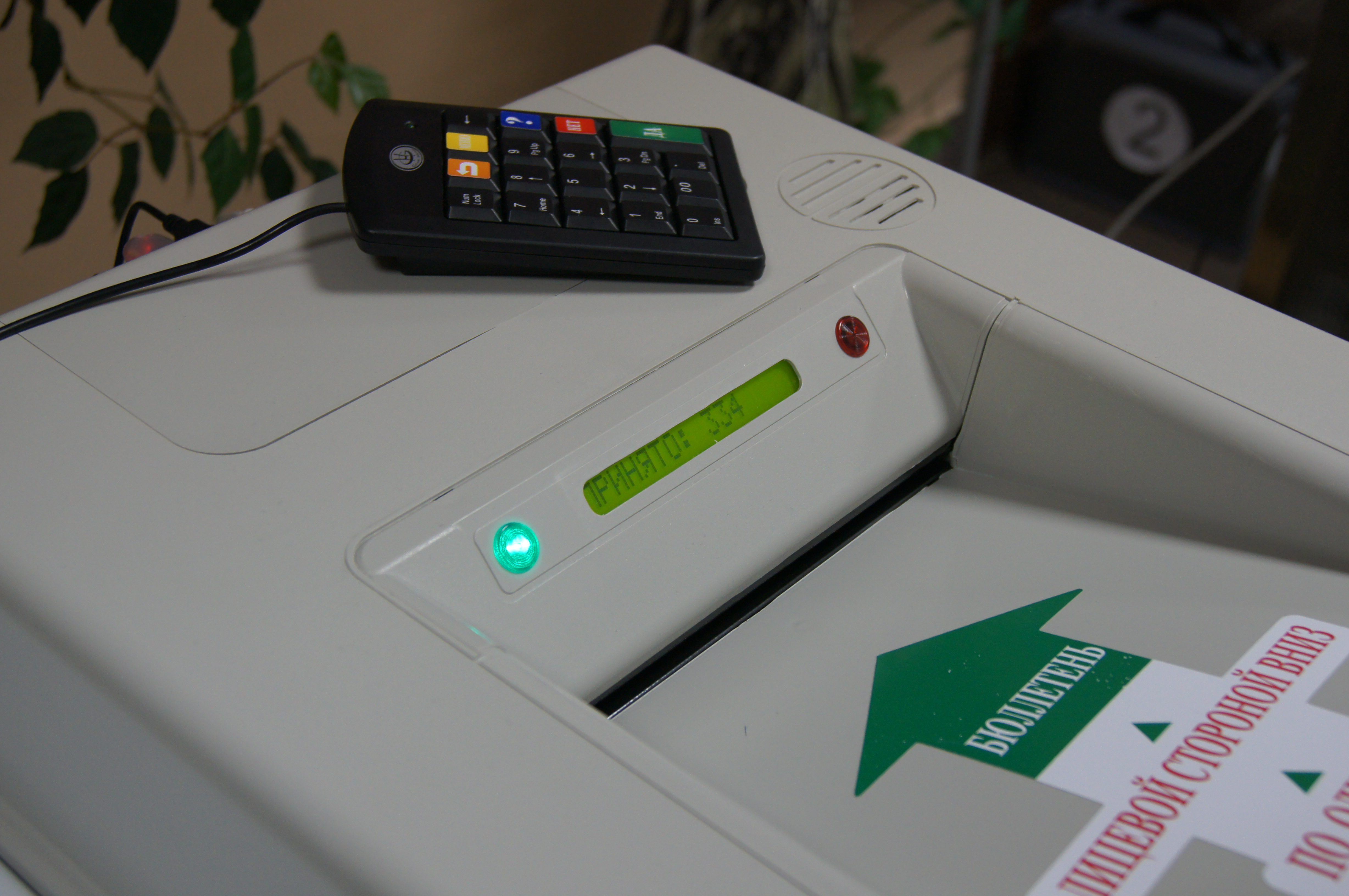 КОИБ в режиме «подведение итогов» с подключённой клавиатурой